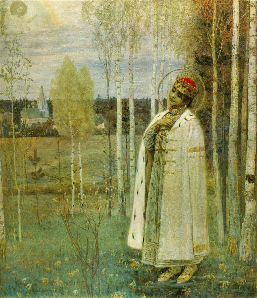 Tsarevich Dimitrylabel QS:Lru,"Царевича Димитрия" label QS:Len,"Tsarevich Dimitry"